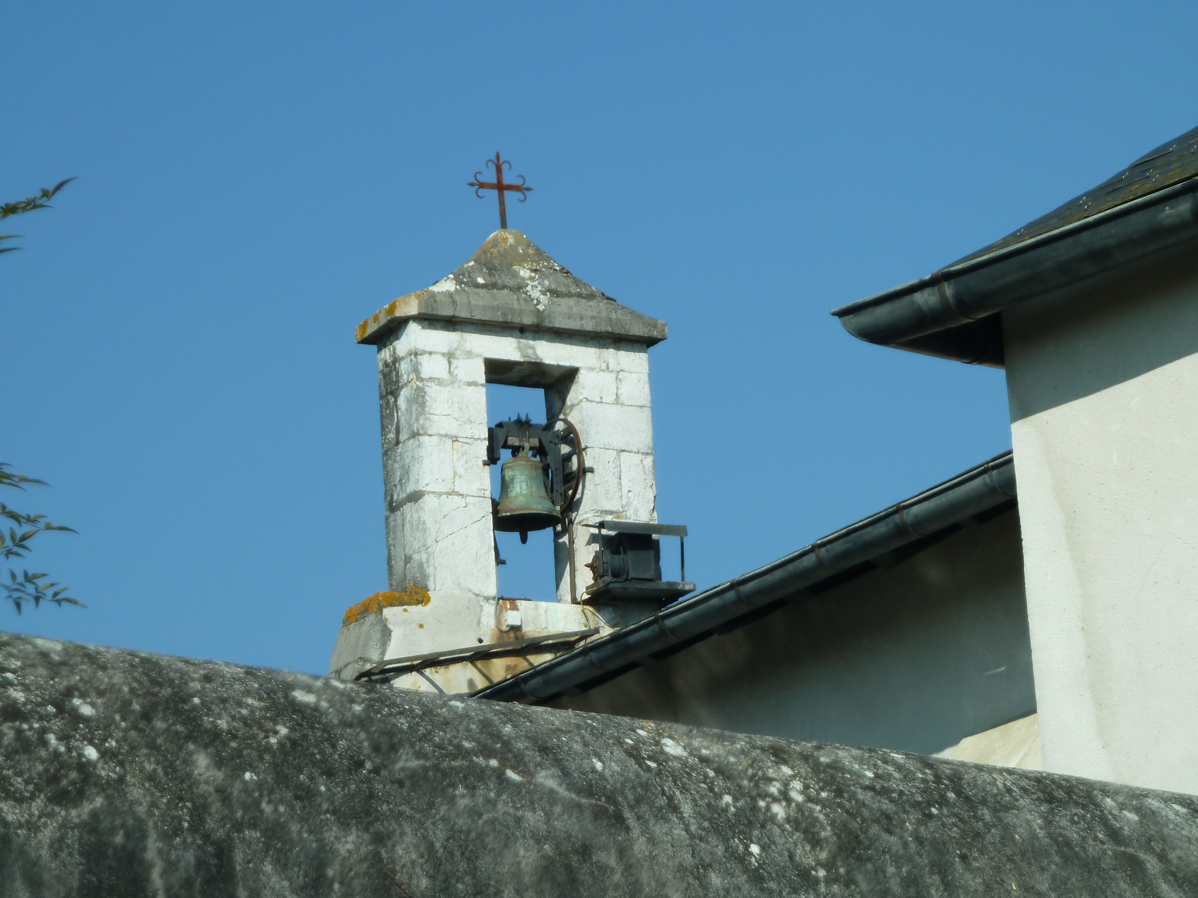 Clocher de l'église de Sarpourenx